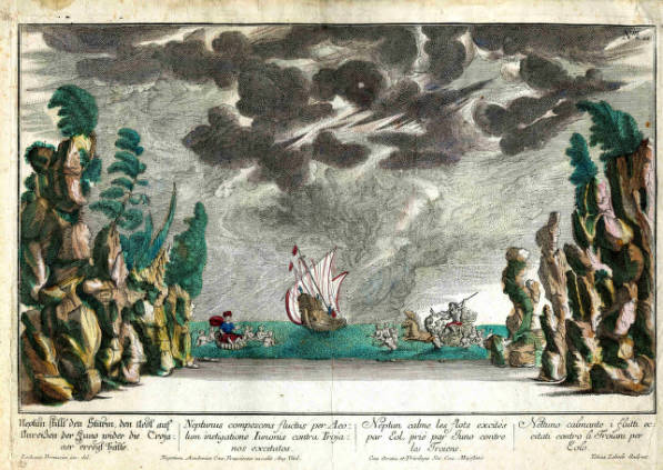 Gravat acolorit de Neptú calmant les flotes excitades per Eolo contra els Troians